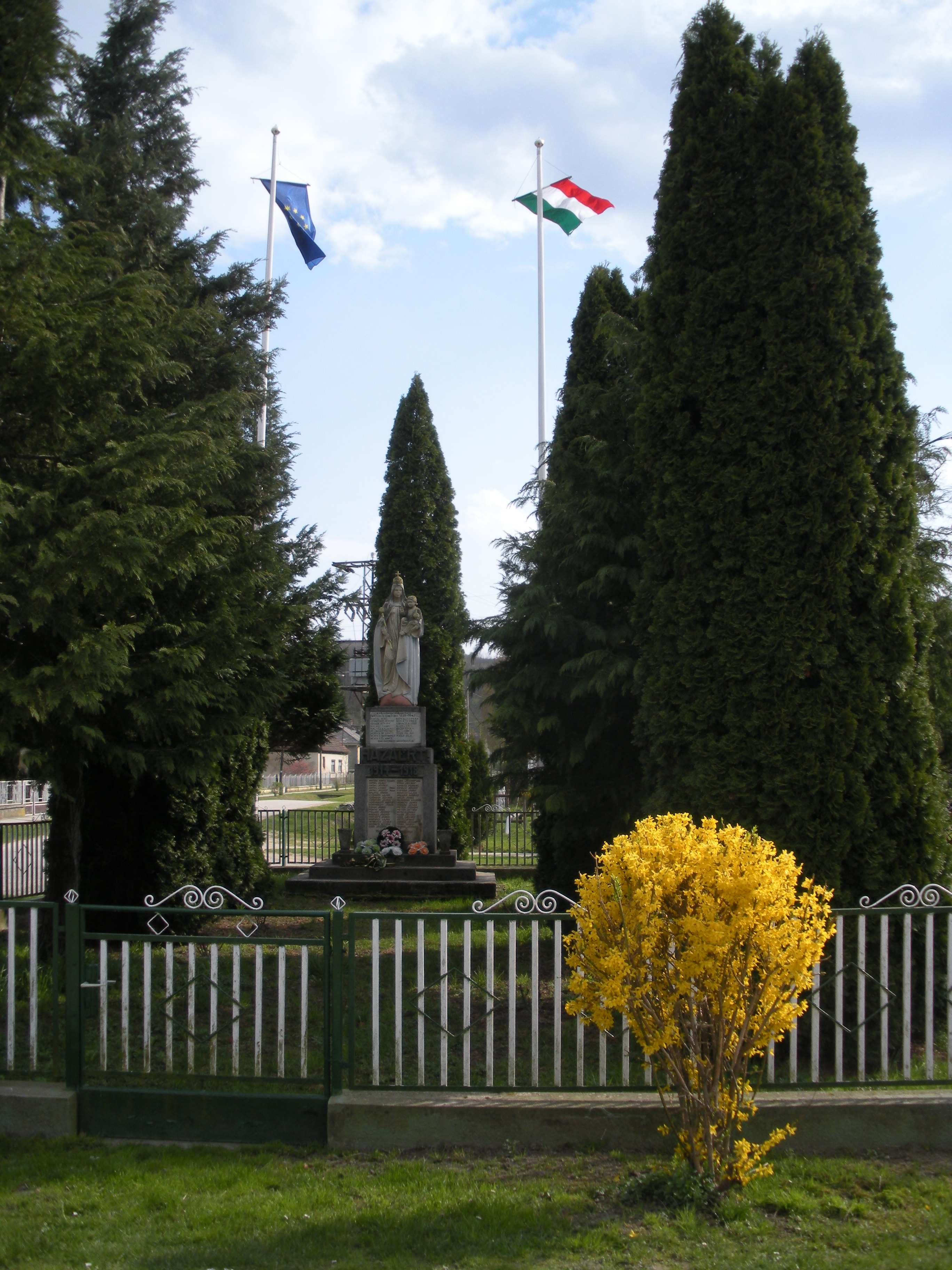 Az ún. "Hősi szobor" (világháborús emlékmű) a falu főterén, Zalamerenye, Zala megye